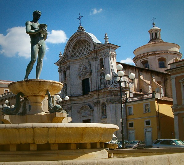 L'Aquila, la piazza del Duomo con a sinistra la Fontana Vecchia di Nicola D'Antino (1880-1966) e la Chiesa di S. Maria del Suffragio (a destra sullo sfondo). categorie:Afbeelding Abruzzen